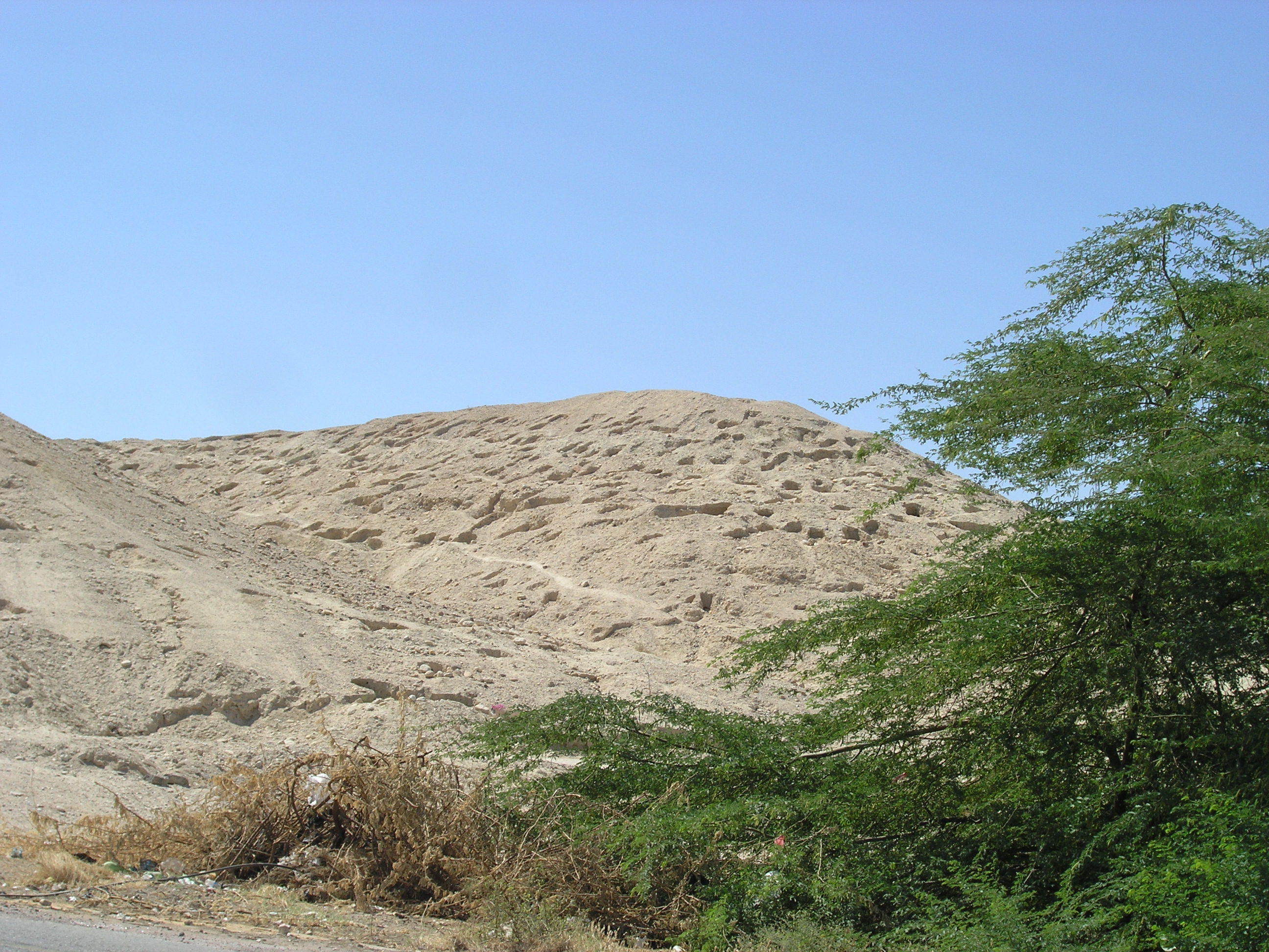 Bab edh-Dhra, Hügel mit Schachtgräbern der Bronzezeit (Cemetery A)